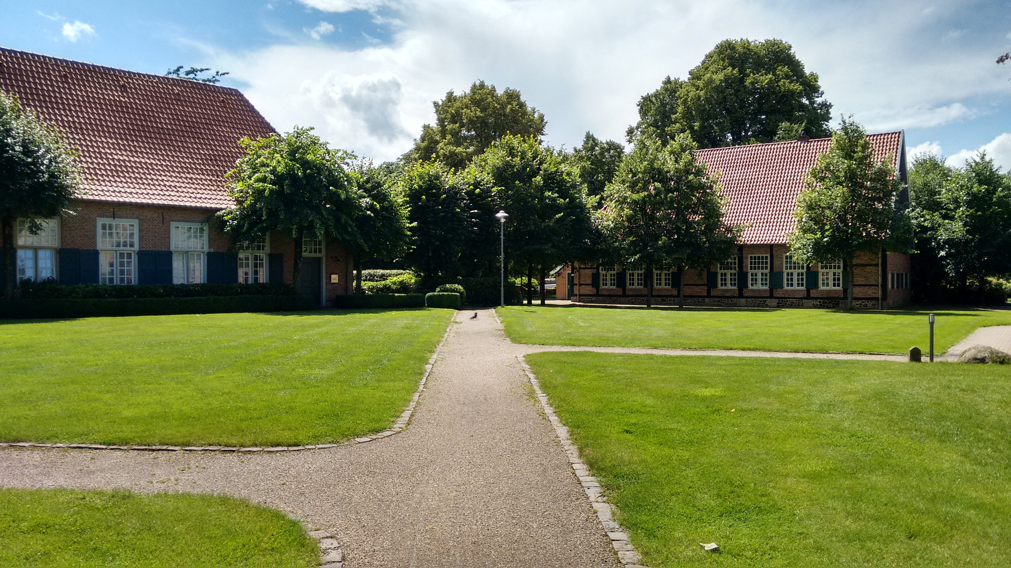 Stiftsdamenhaus und Verwalterhaus